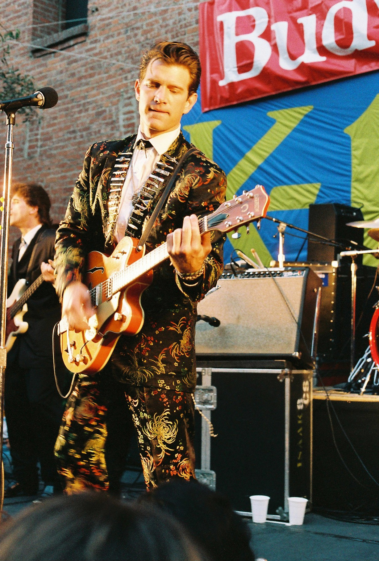 Chris Isaak on stage in San Francisco in 1988 at the Cannery